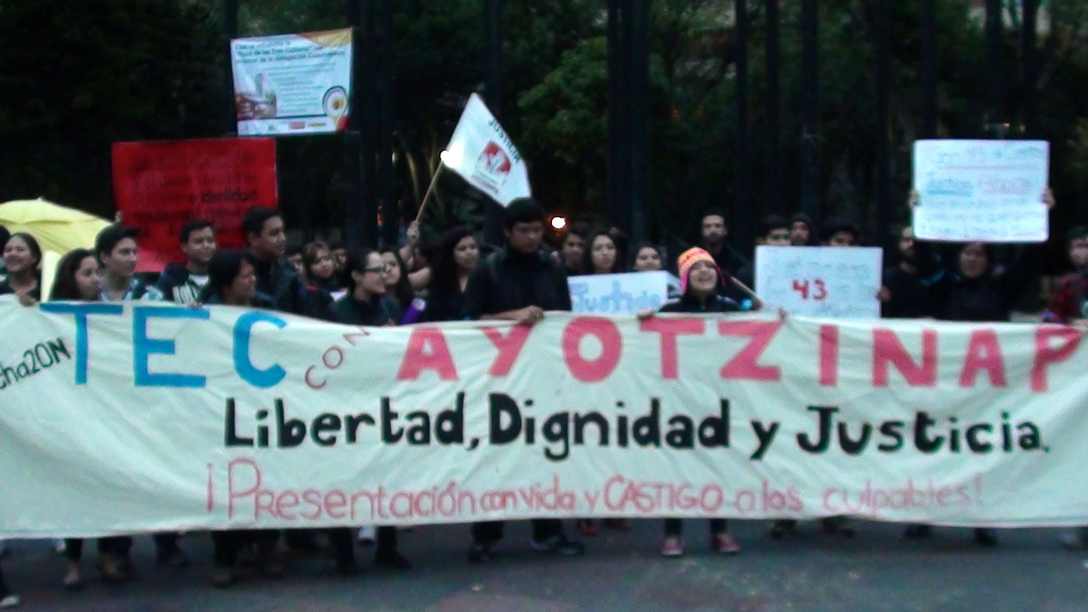 Contingente de estudiantes del Tec de Monterrey en la marcha “Júrame que no te rindes” por los 43 normalistas desaparecidos en Iguala, Guerrero. En carteles expresan sus demandas. El contingente, listo para salir, está en la Plaza de las Tres Culturas para salir con caravana “Julio César Mondragón Fontes”, que marchó desde Tlatelolco, hasta el Centro Histórico de la Ciudad de México, México.